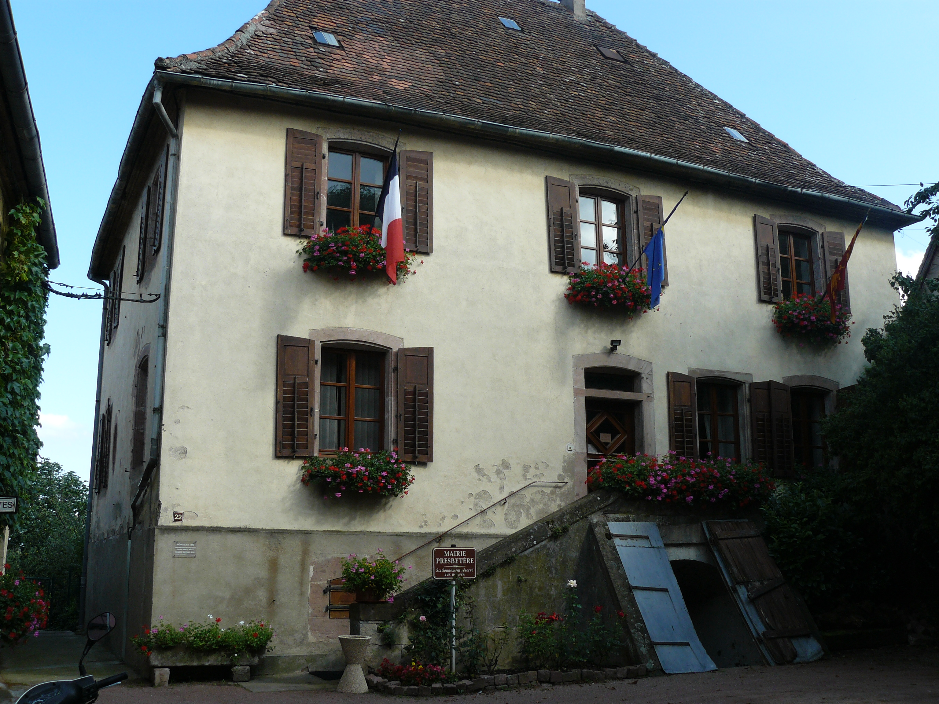 Mairie-Presbytère